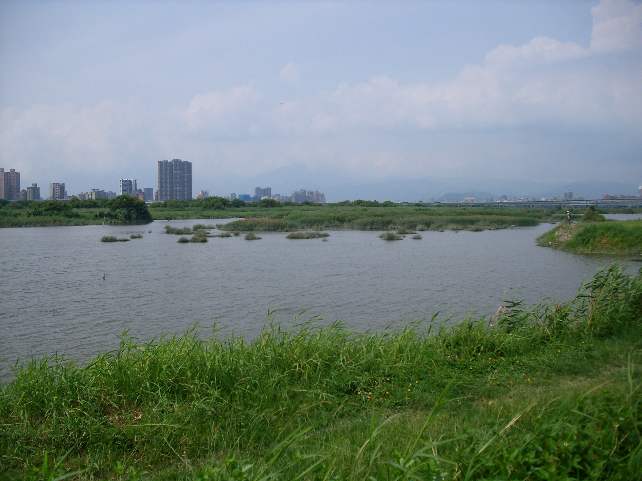 臺北市野雁保護區之中興橋至華江橋水域，旁邊是華江雁鴨自然公園